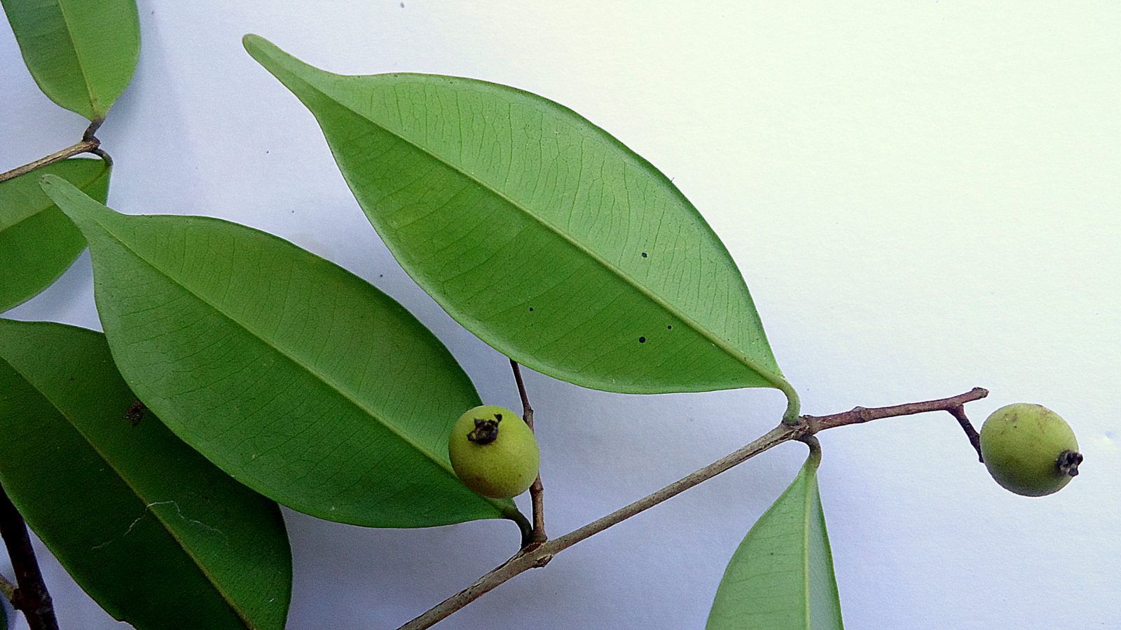 Tree 6 m. Popovkin & Mendes 894 (HUEFS).